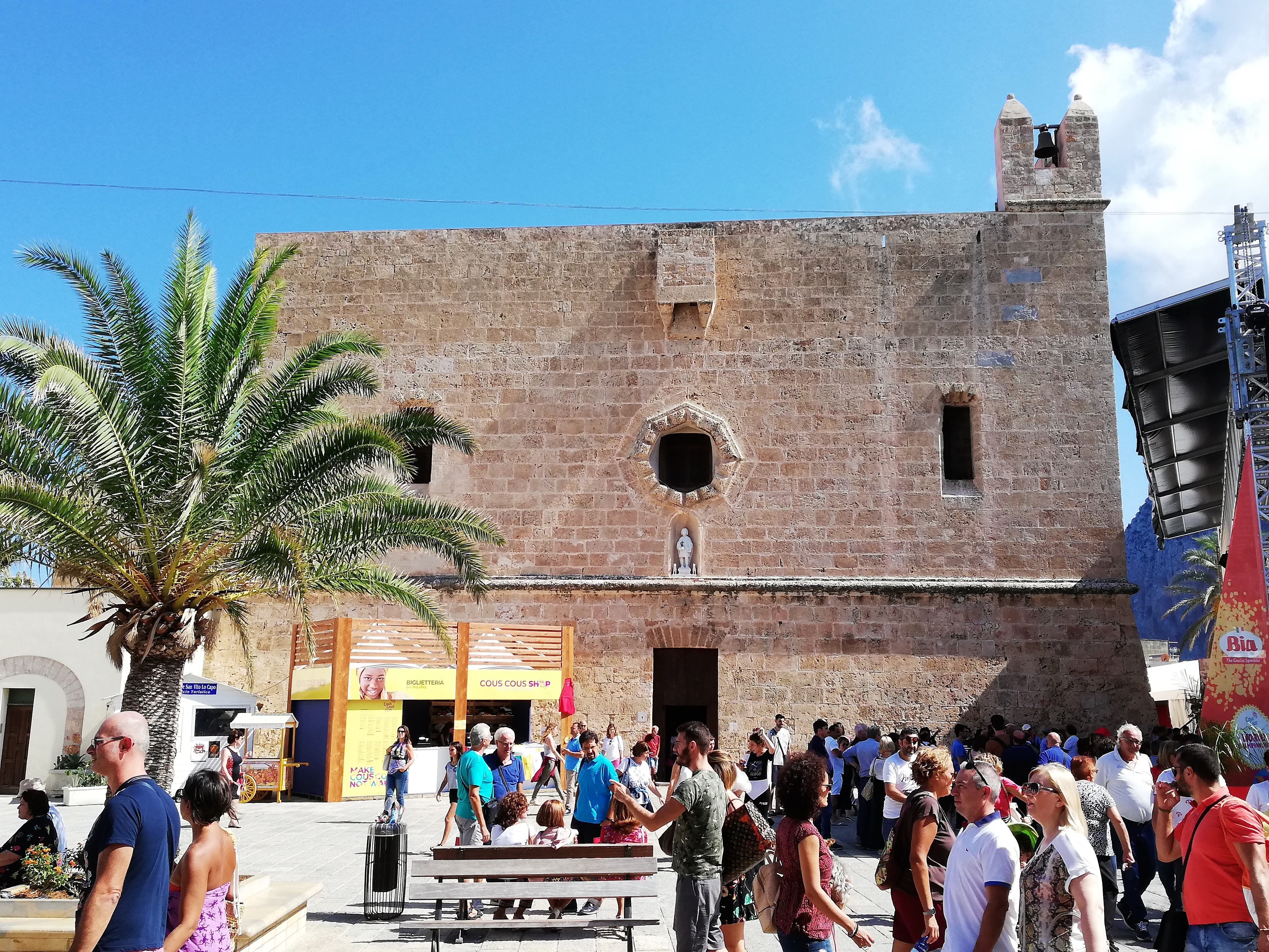 Facciata.